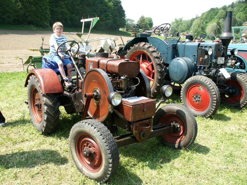 Fendt Dieselross, Baujahr 1938